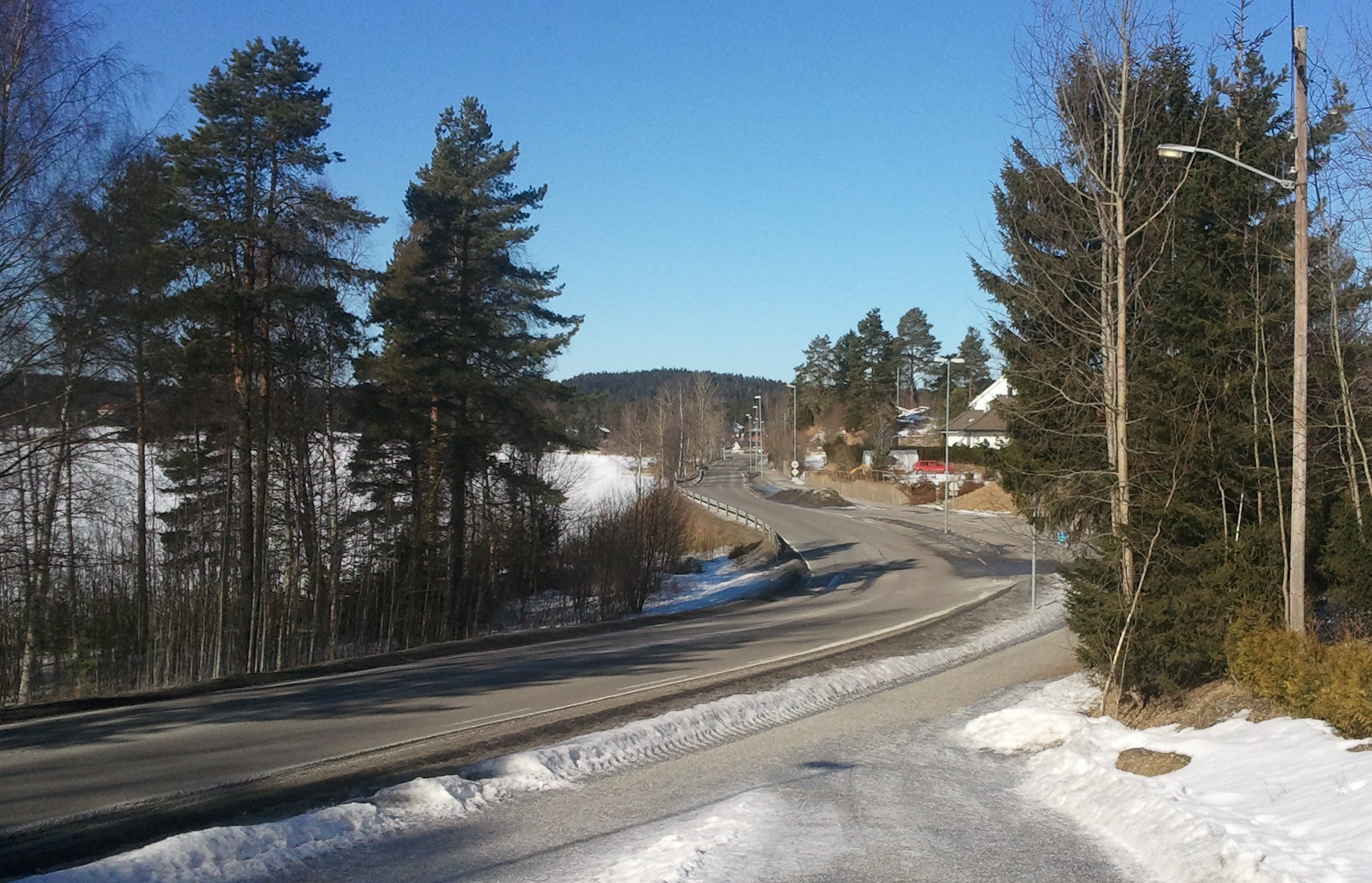 Fylkesvei 155 langs Våg i Ytre Enebakk